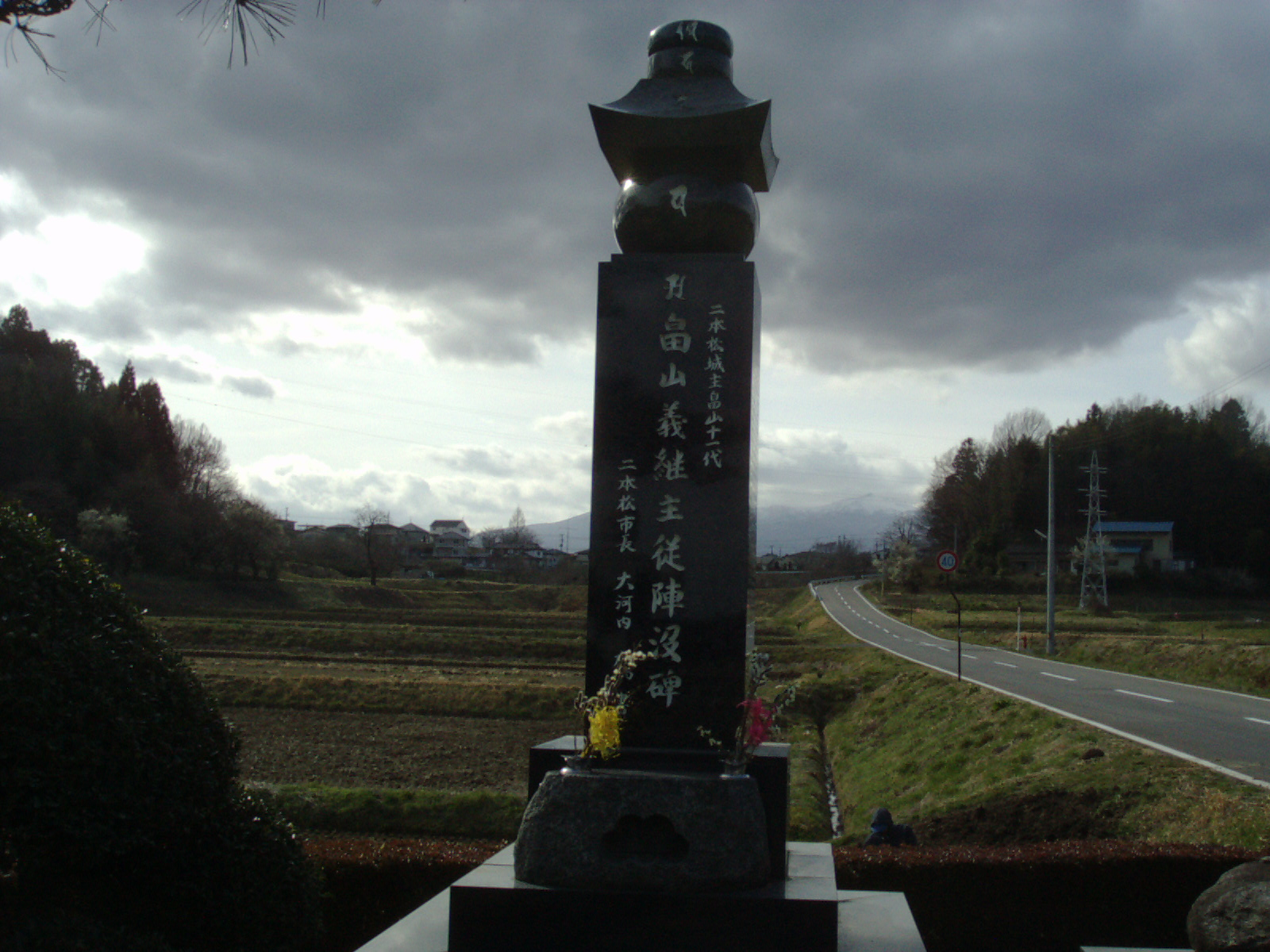 畠山義継戦死の地